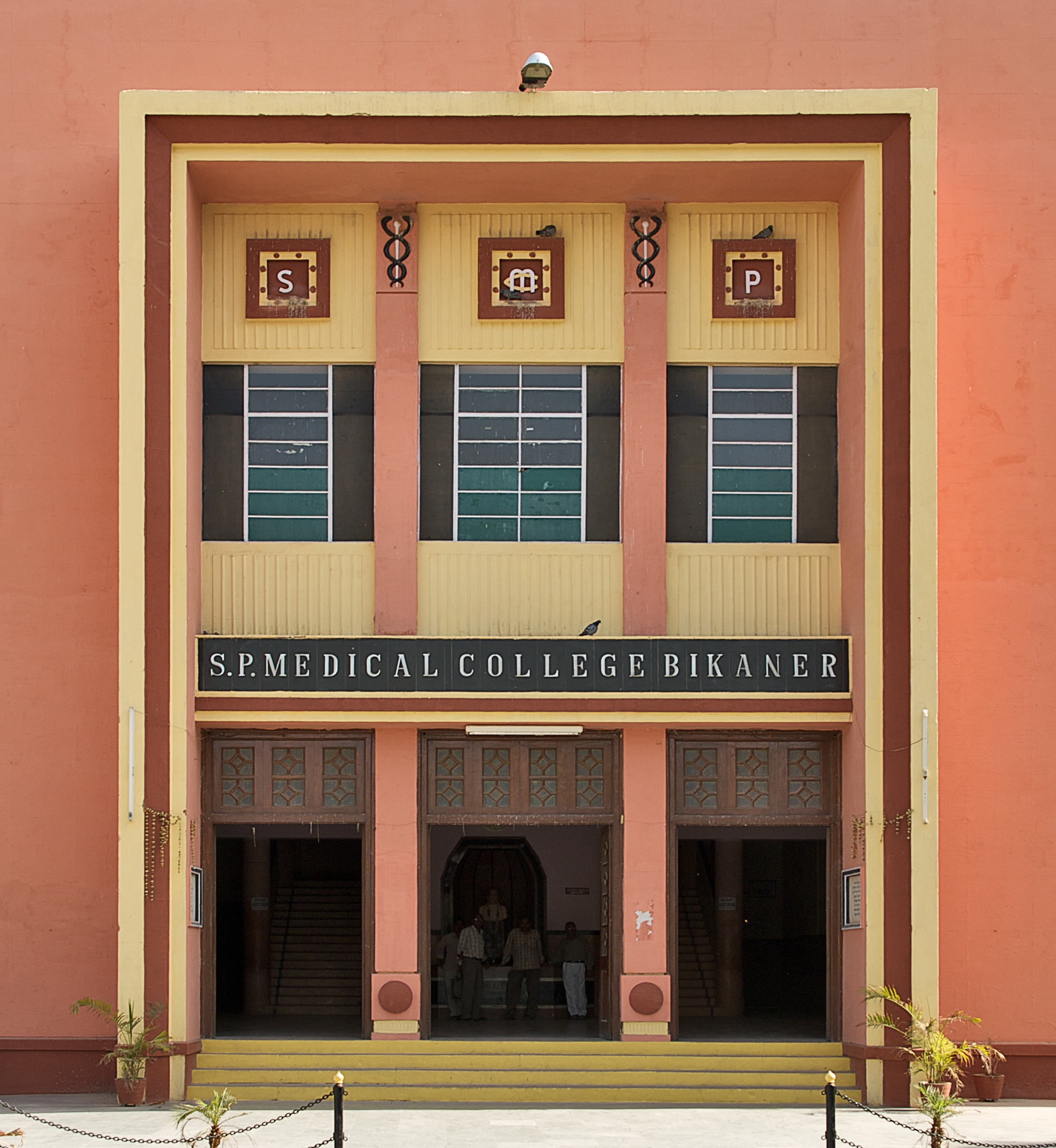 Sardar Patel Medical College